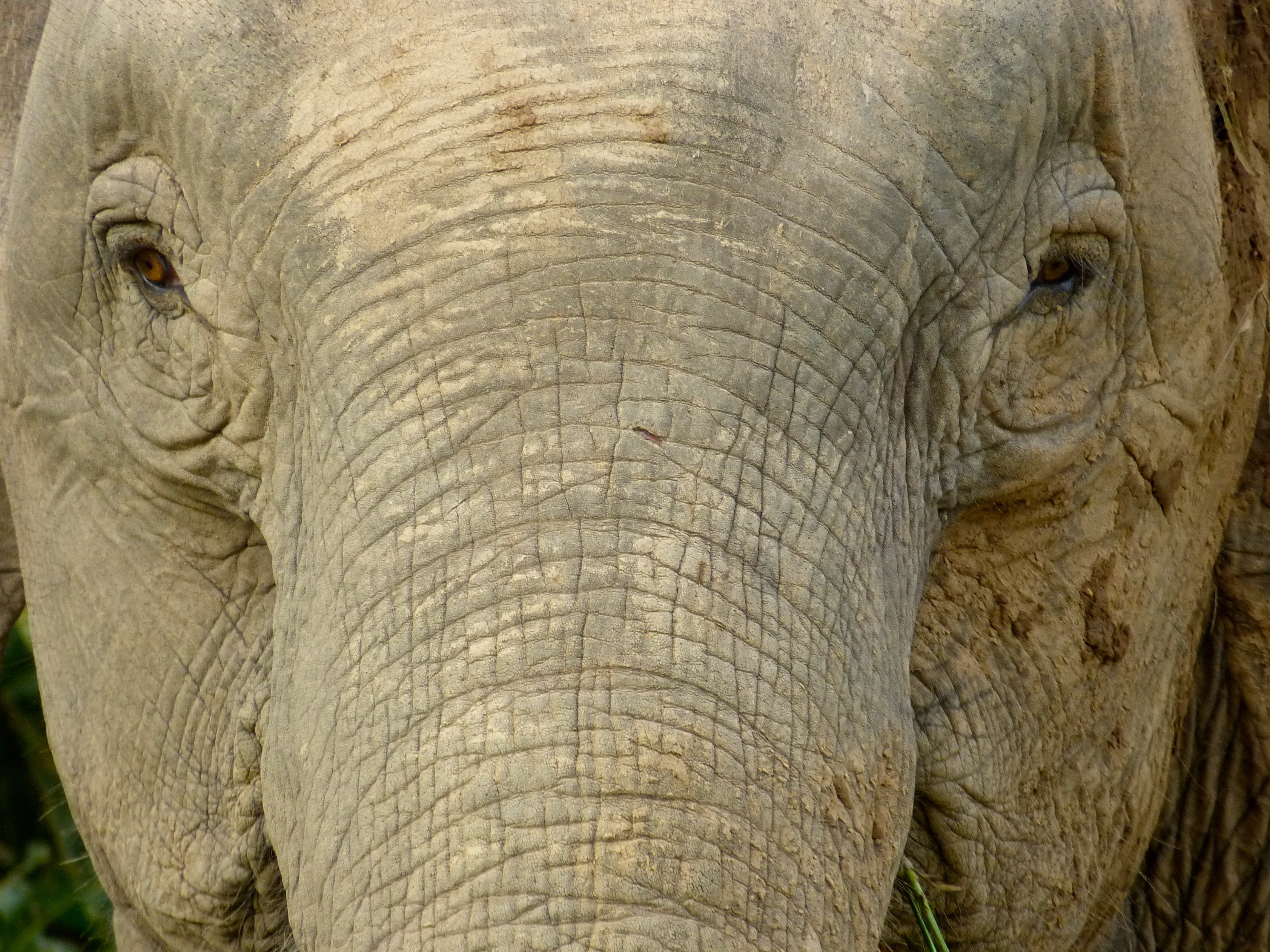 Kinabatangan River, Sukau, Sabah, MALAYSIA